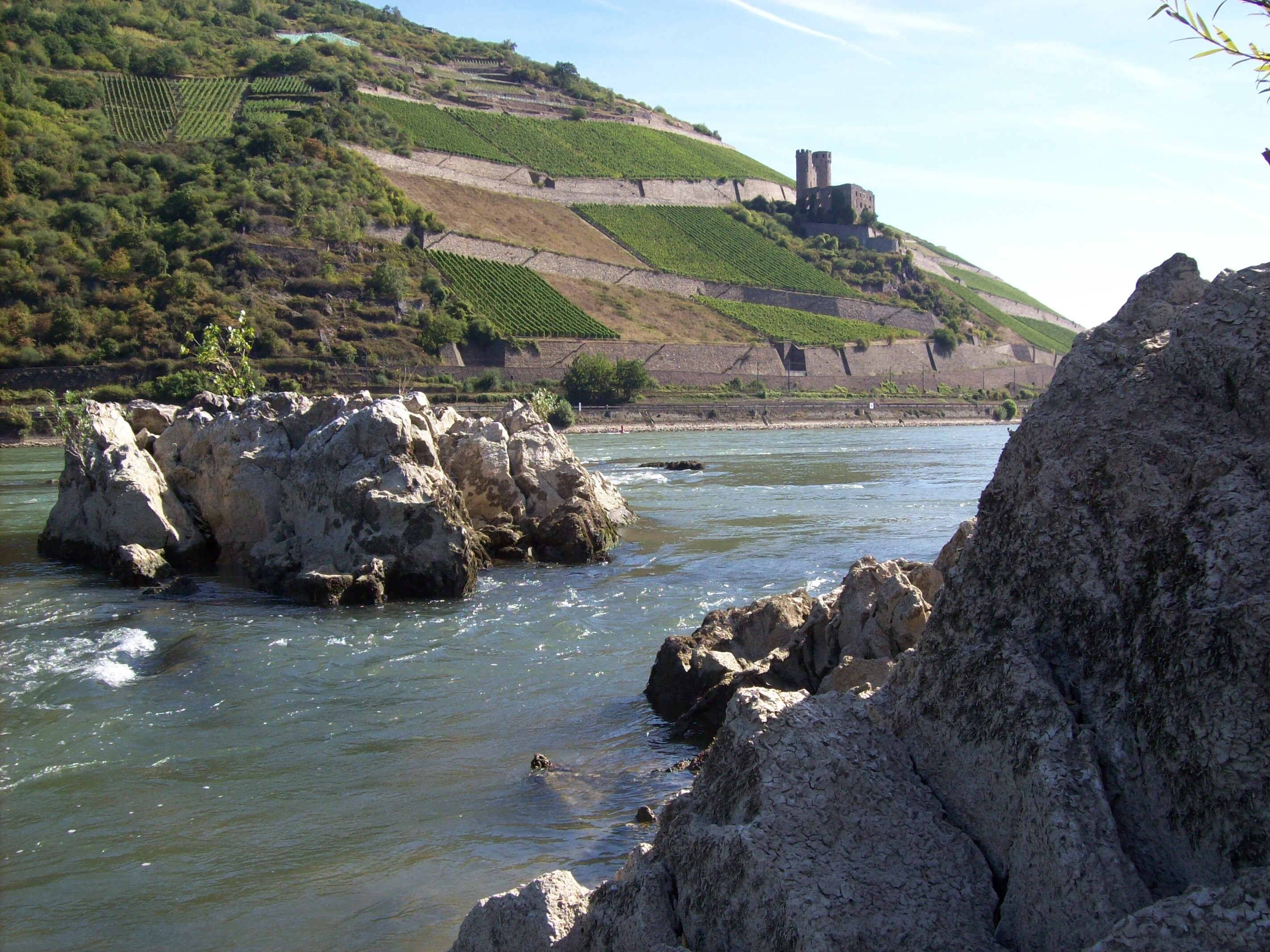 Lochsteine im Rhein bei Bingen. Pegel Bingen bei 135 cm.